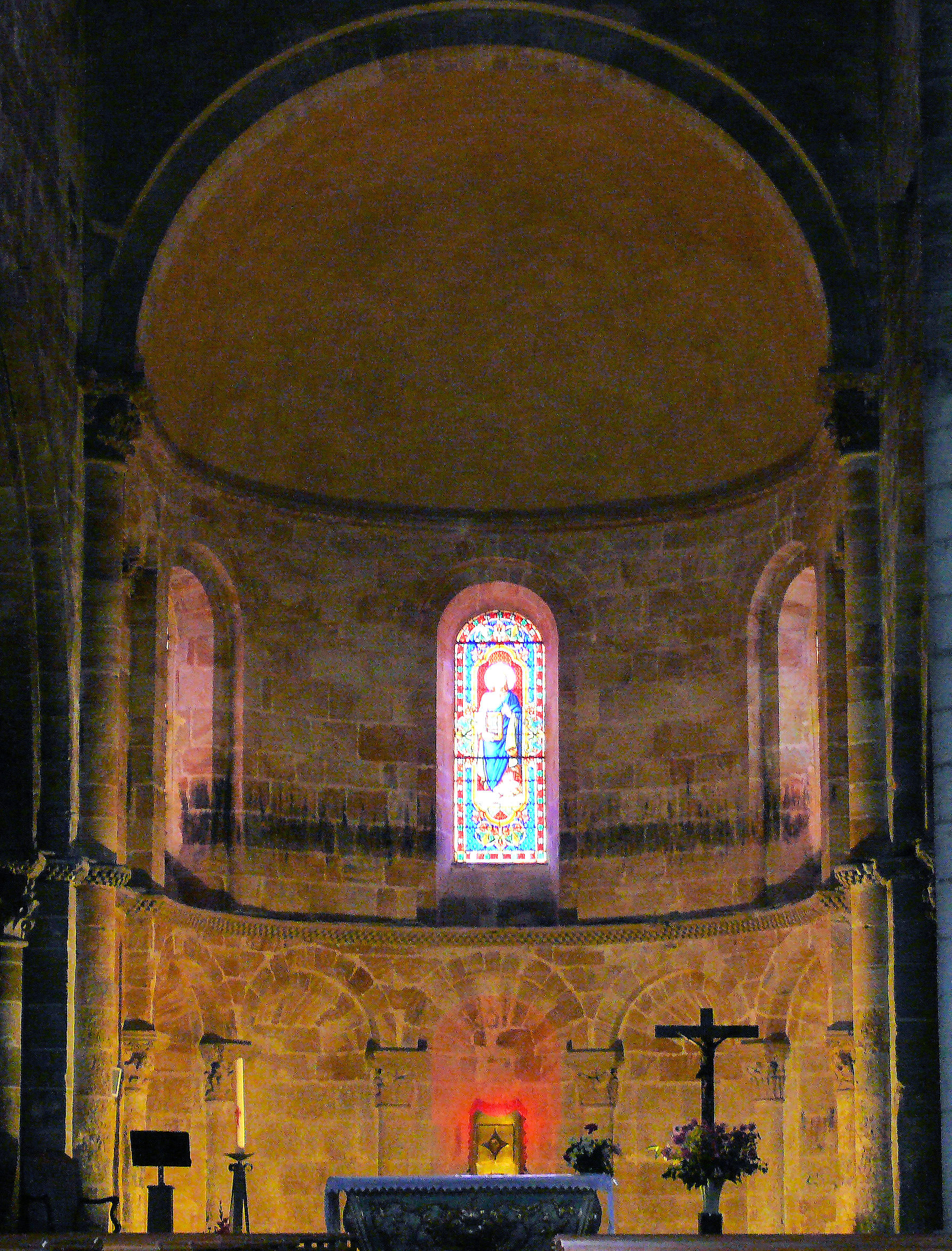 Nogaro - Collégiale Saint-Nicolas - Abside